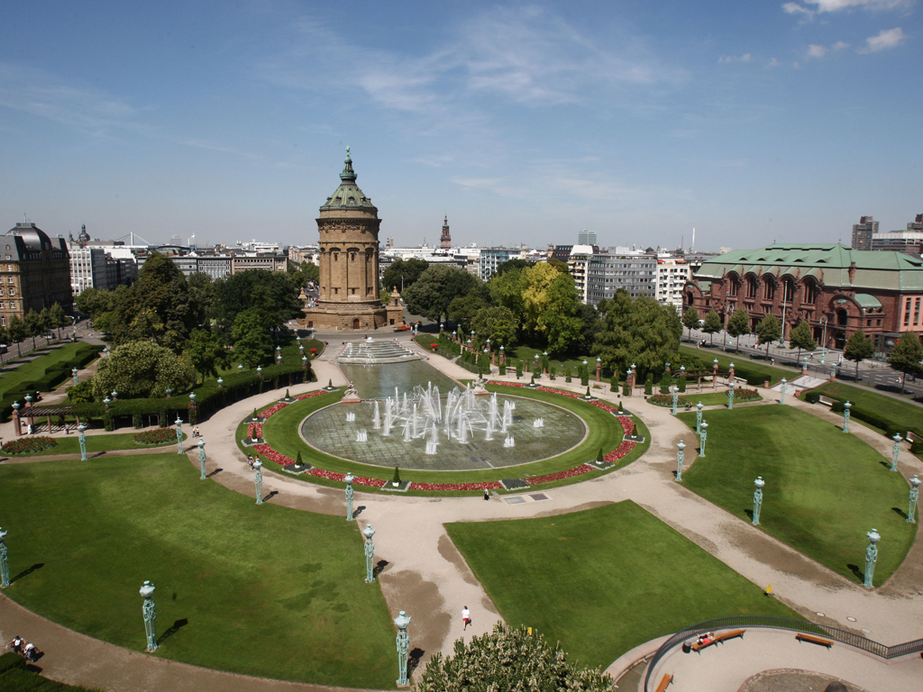 Der Friedrichsplatz und der Wasserturm. Bei Nutzung des Fotos bitte angeben: Foto: Stadtmarketing Mannheim GmbH